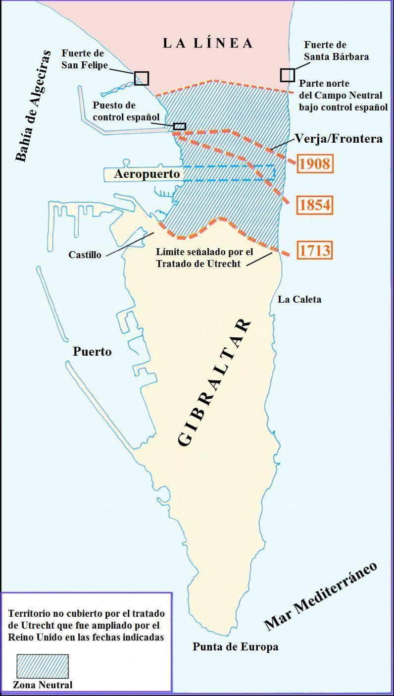 Territorio del istmo de Gibraltar no reconocido como británico por EspañaGalego: O Campo Neutral de Xibraltar na actualidade, conforme ao Tratado de Utrecht